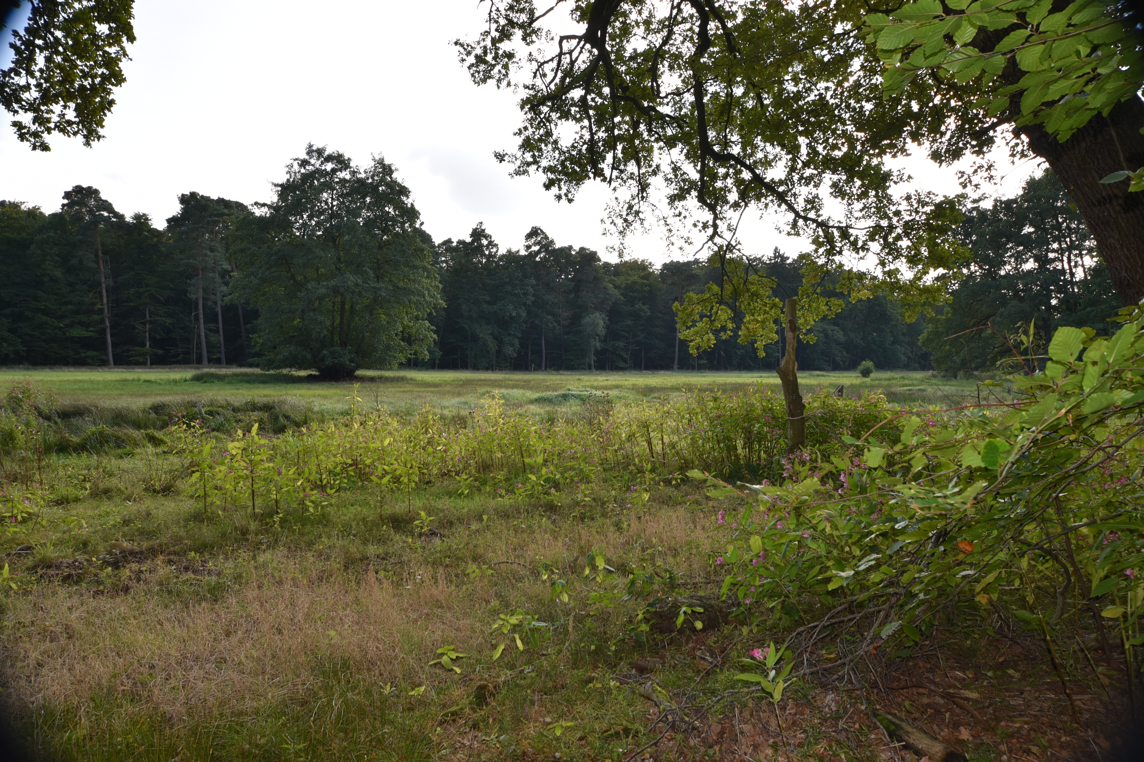 Das Foto zeigt das NSG Faulbruch bei Erzhausen/Egelbach.